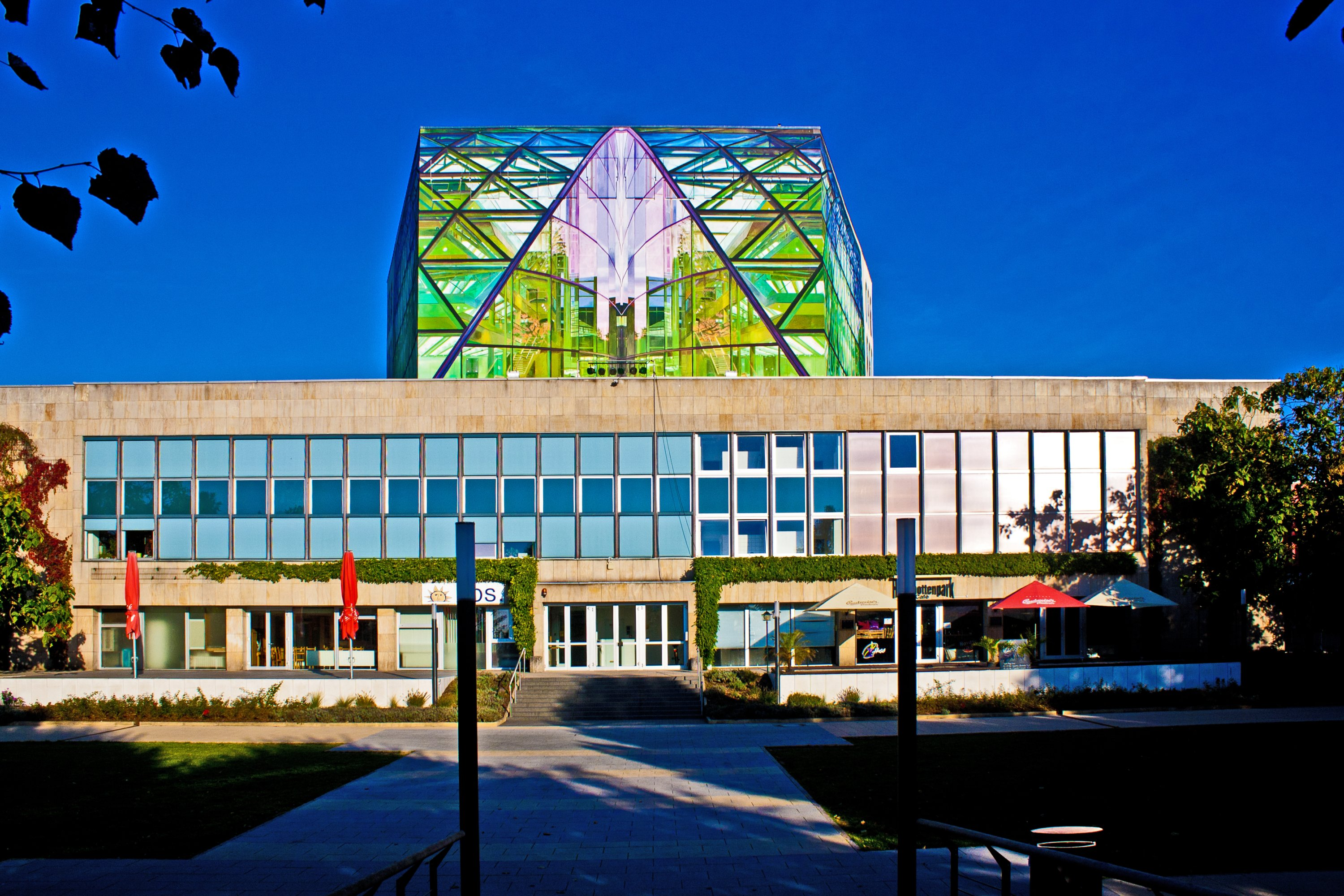 Uckermärkische Bühnen Schwedt - Vision gläserner Bühnenturm